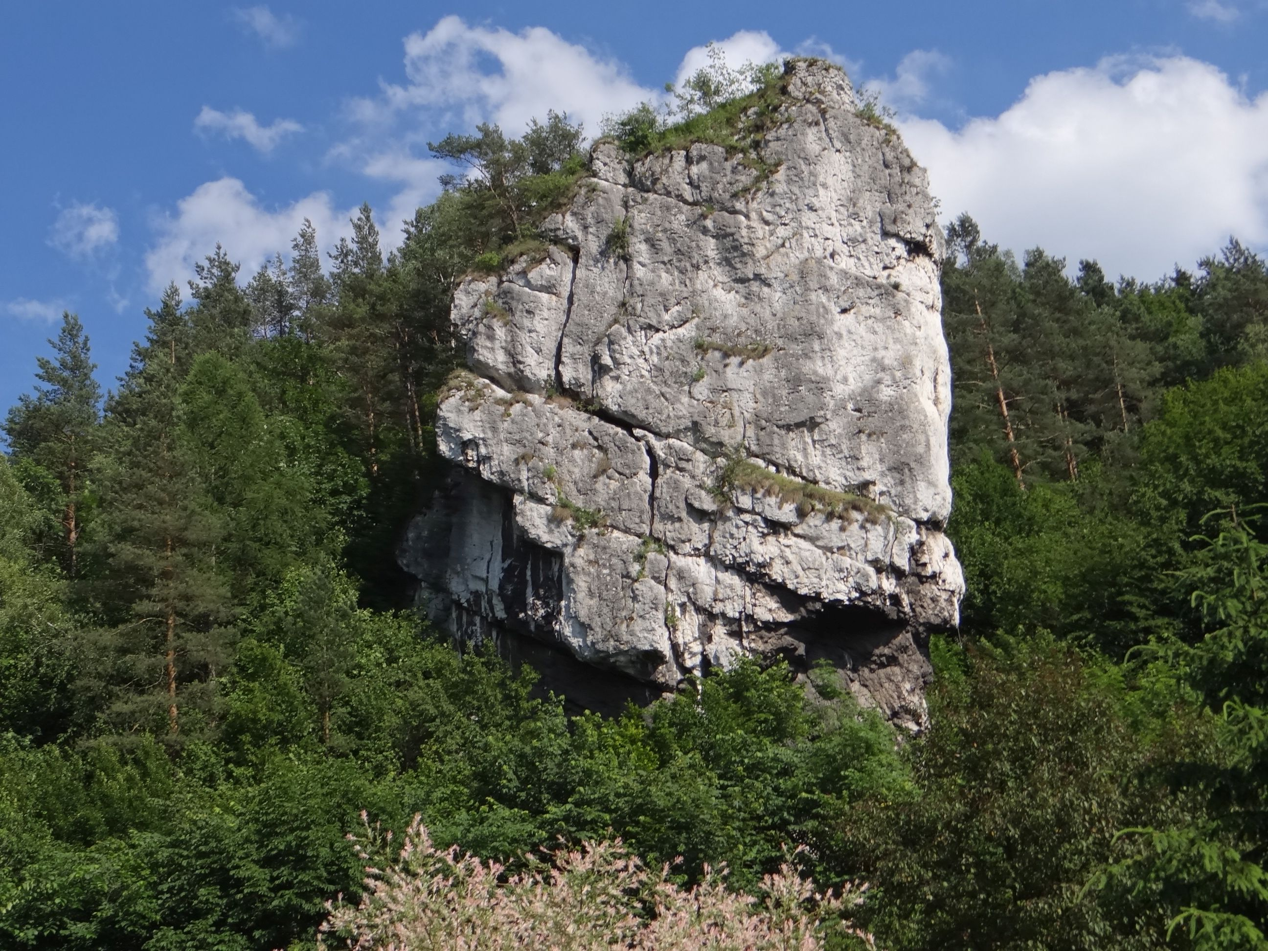 Duży Pochylec w Ojcowskim Parku Narodowym